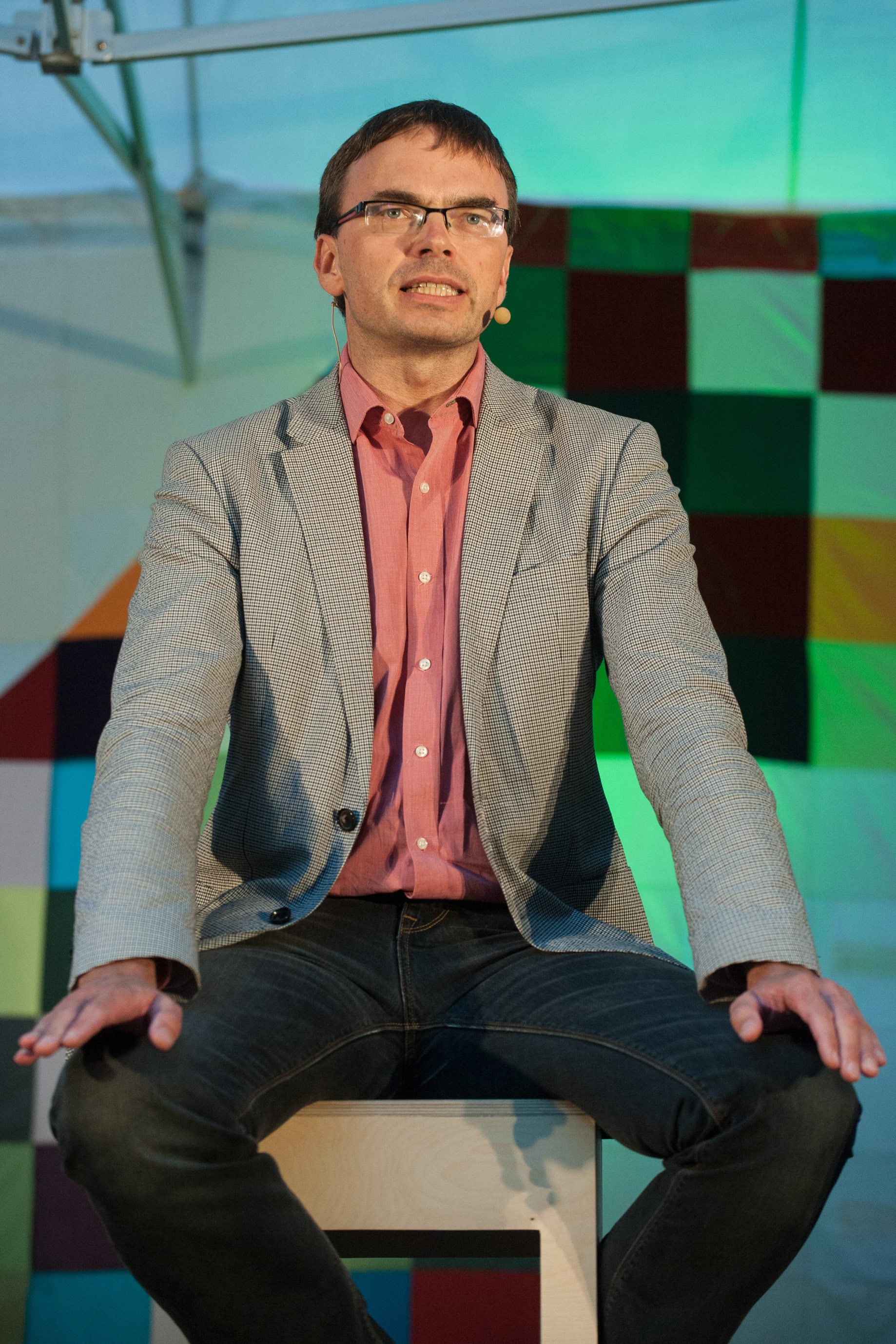 Arvamusfestival 2014: Parlamendierakondade juhtide debatt